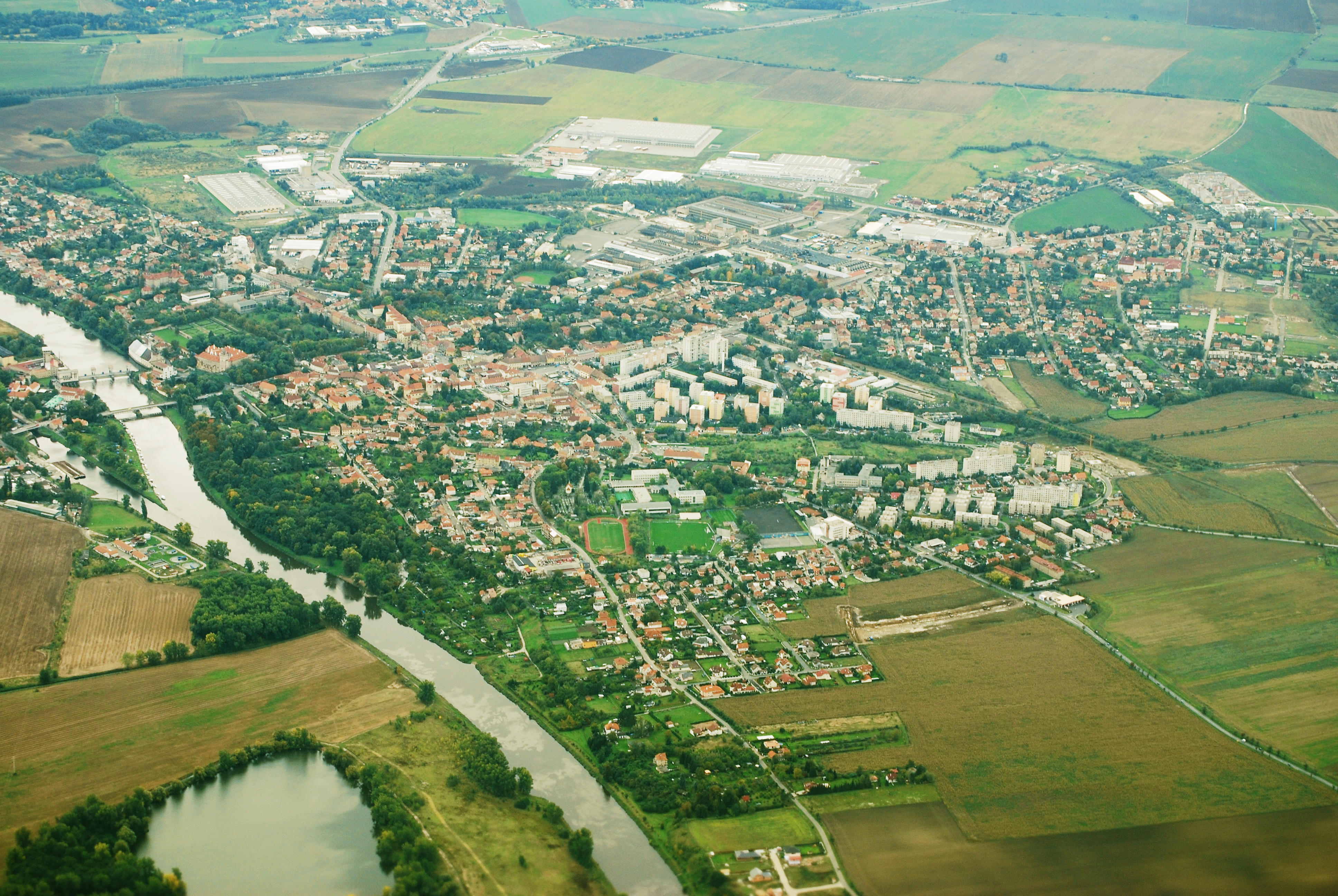 Brandýs nad Labem, Central Bohemia